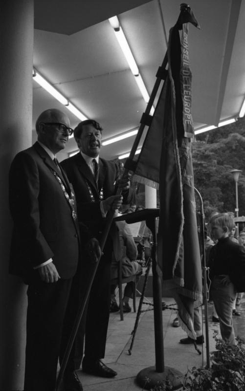 Bgm. (Erhard) Jakobsen (von Gladaxe und Reichstagsabgeordneter), Dänemark, überreicht Bgm. (Franz) Linz, Godesberg, eine Europafahne